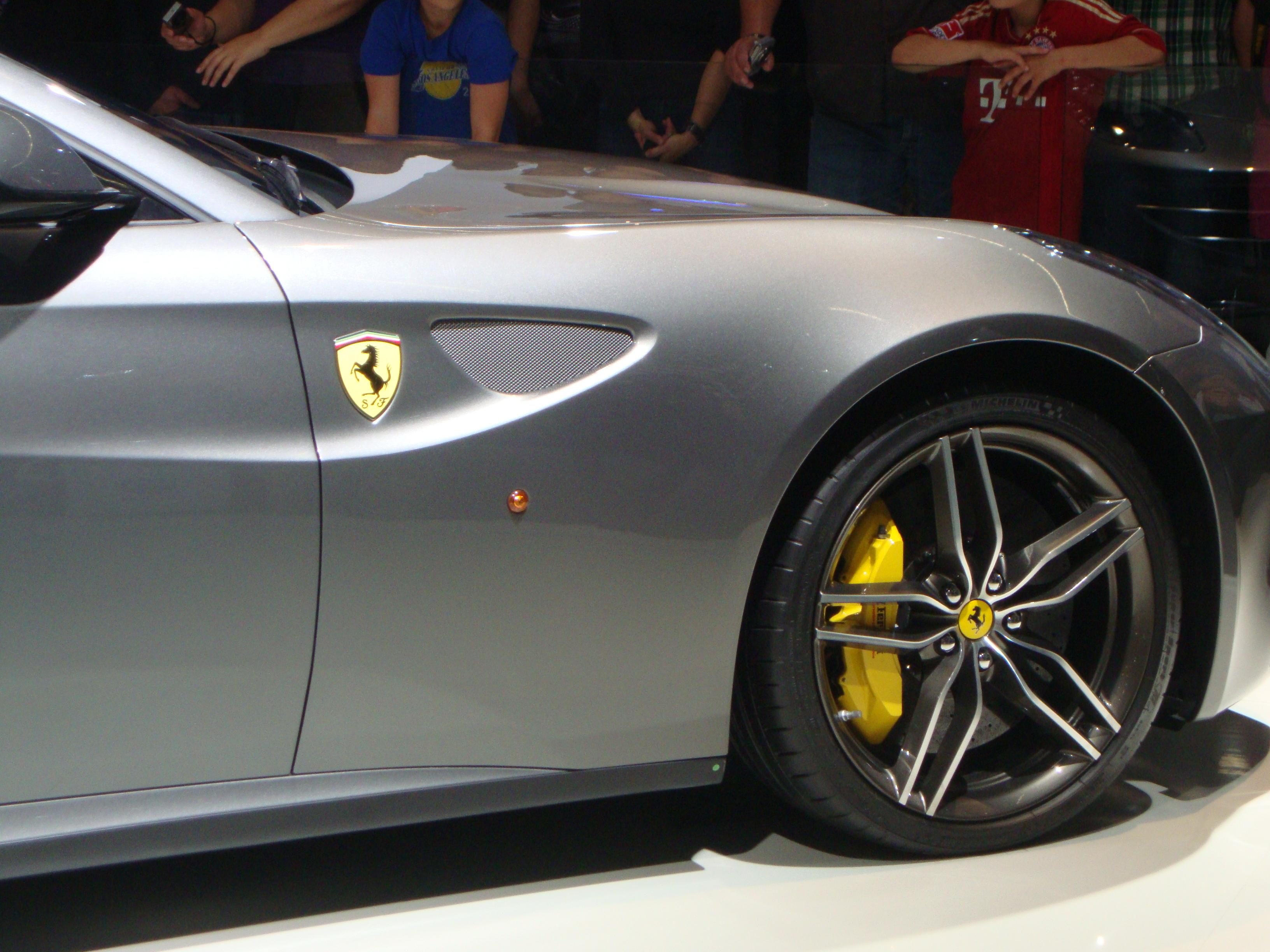 IAA Frankfurt